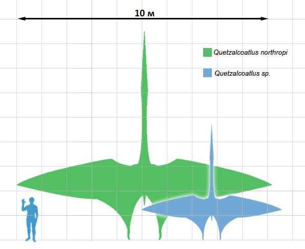 Сравнение размеров птерозавров-аждархид Quetzalcoatlus northropi и неназванного вида Quetzalcoatlus с человеком. Создано на основе диаграммы Witton and Naish (2008).